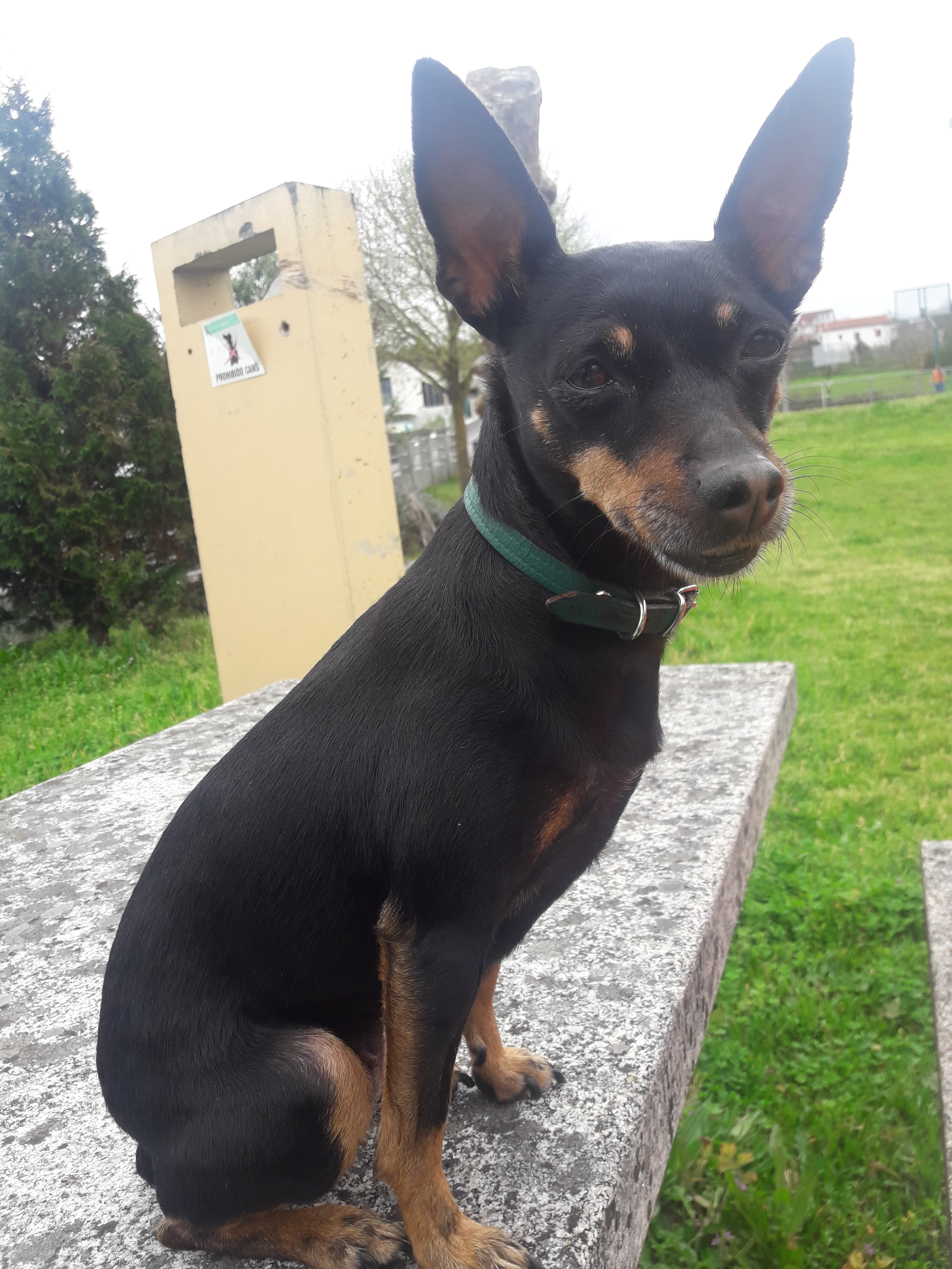 Pinscher miniatura